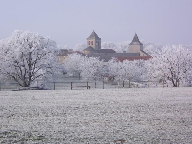 Photo du village d'Issendolus sous le givre